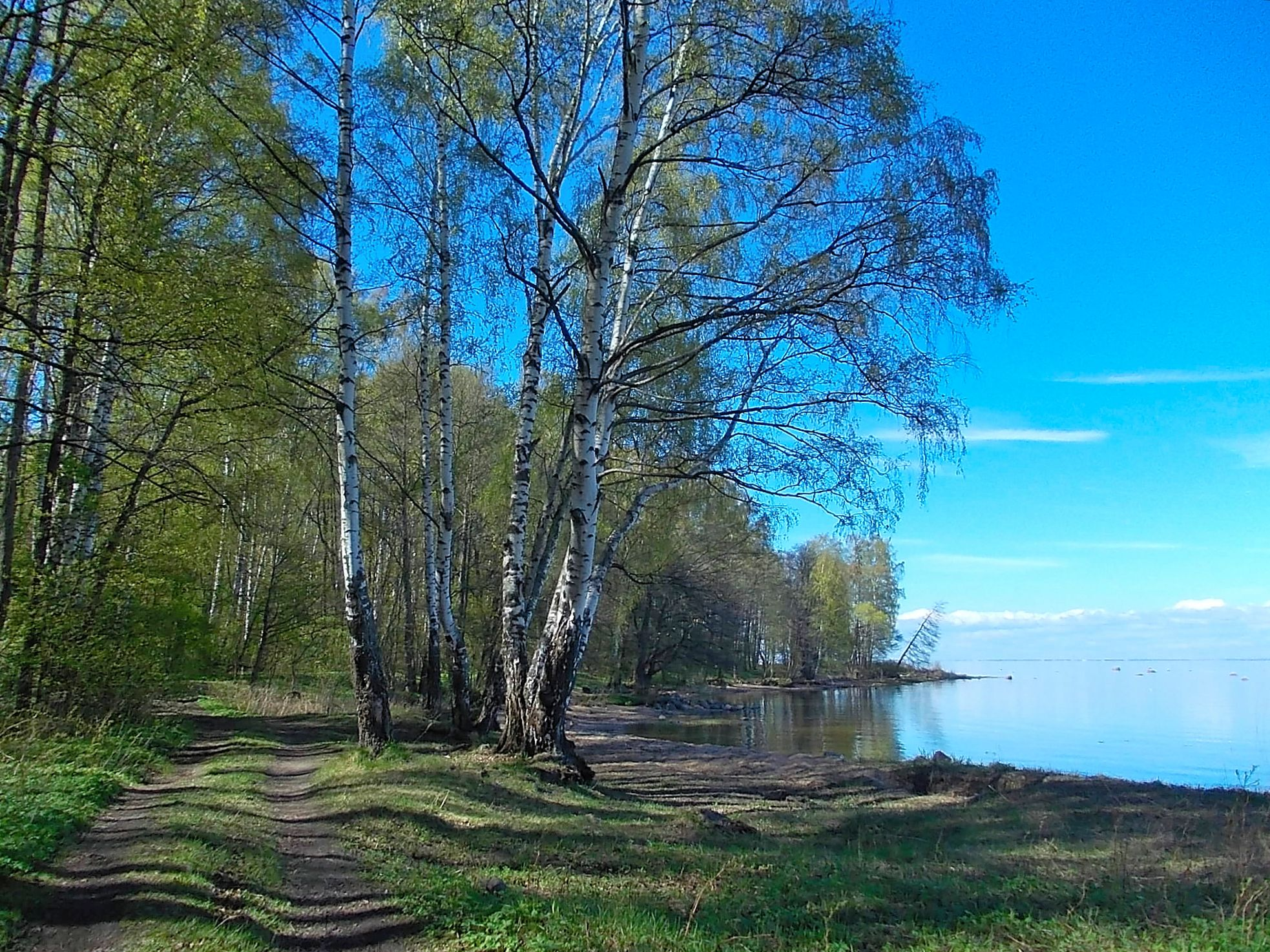 На окраине парка у Финского залива